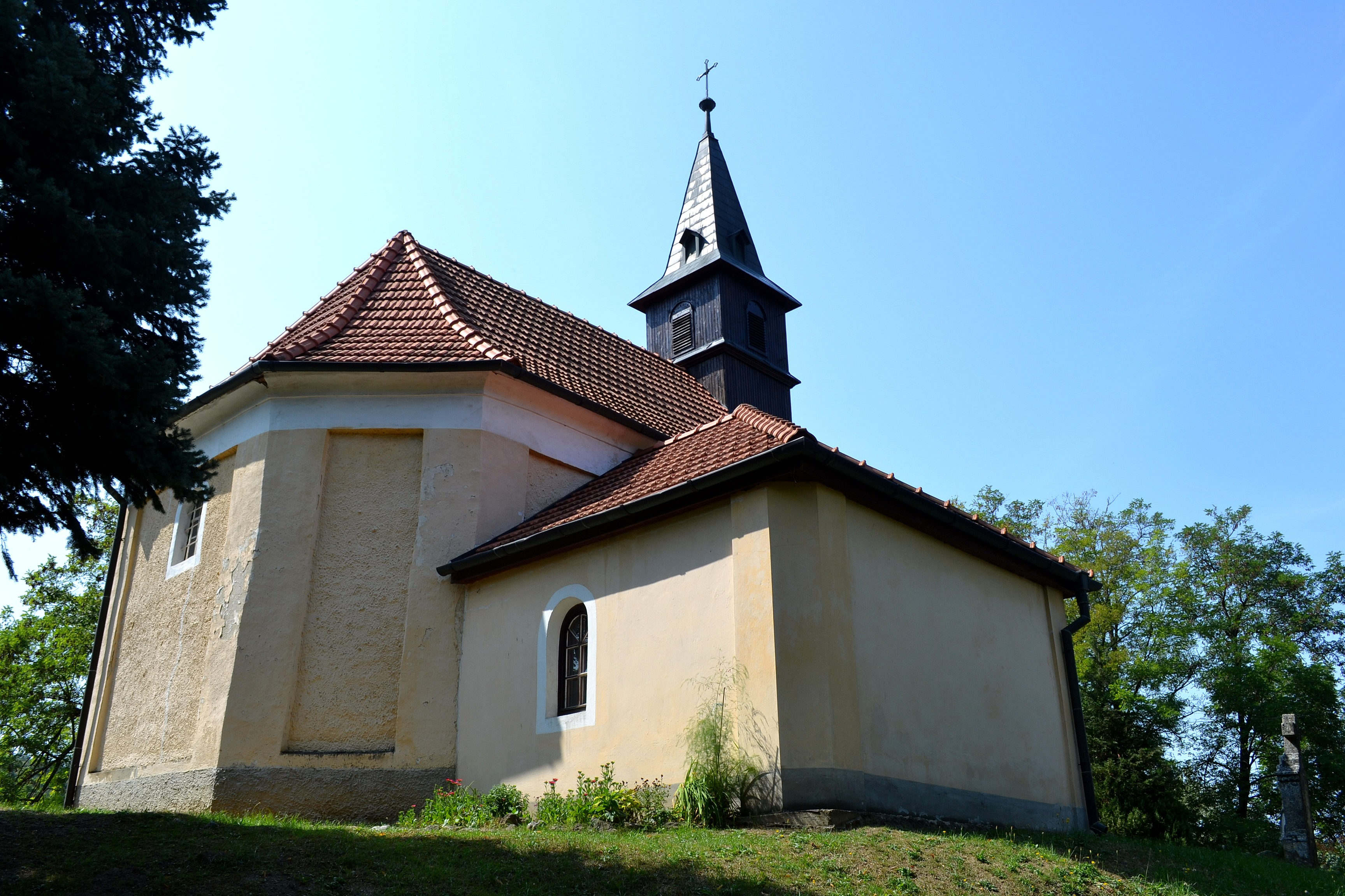 Jalšové (okr. Hlohovec), Kostol svätého Martina (uváda sa aj svätého Ducha); celkový pohľad